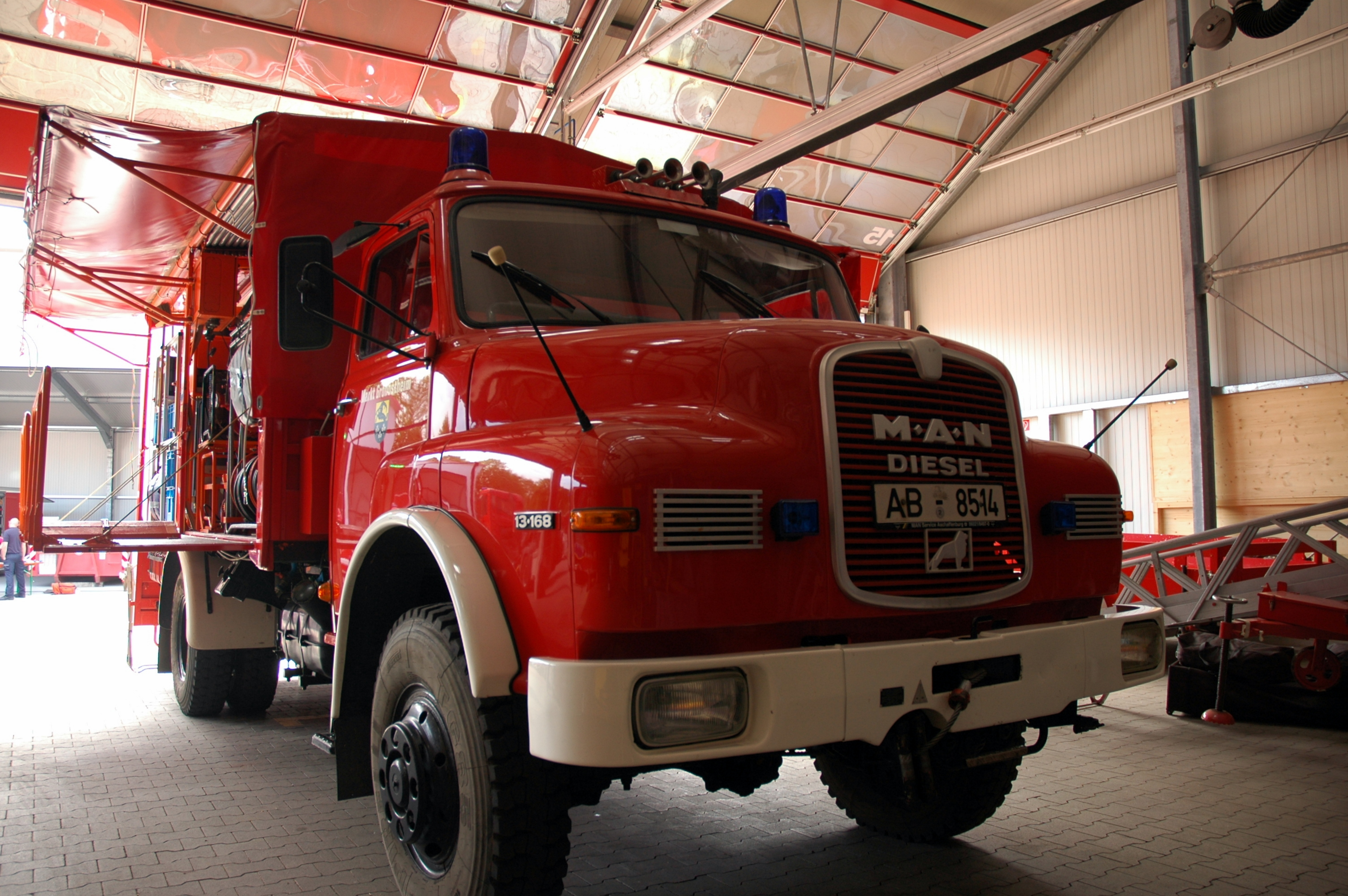 Großostheim - Feuerwehr - MAN 13-168 HA - Odenwaldwerke - AB-8514 - 2018-04-29 16-52-57